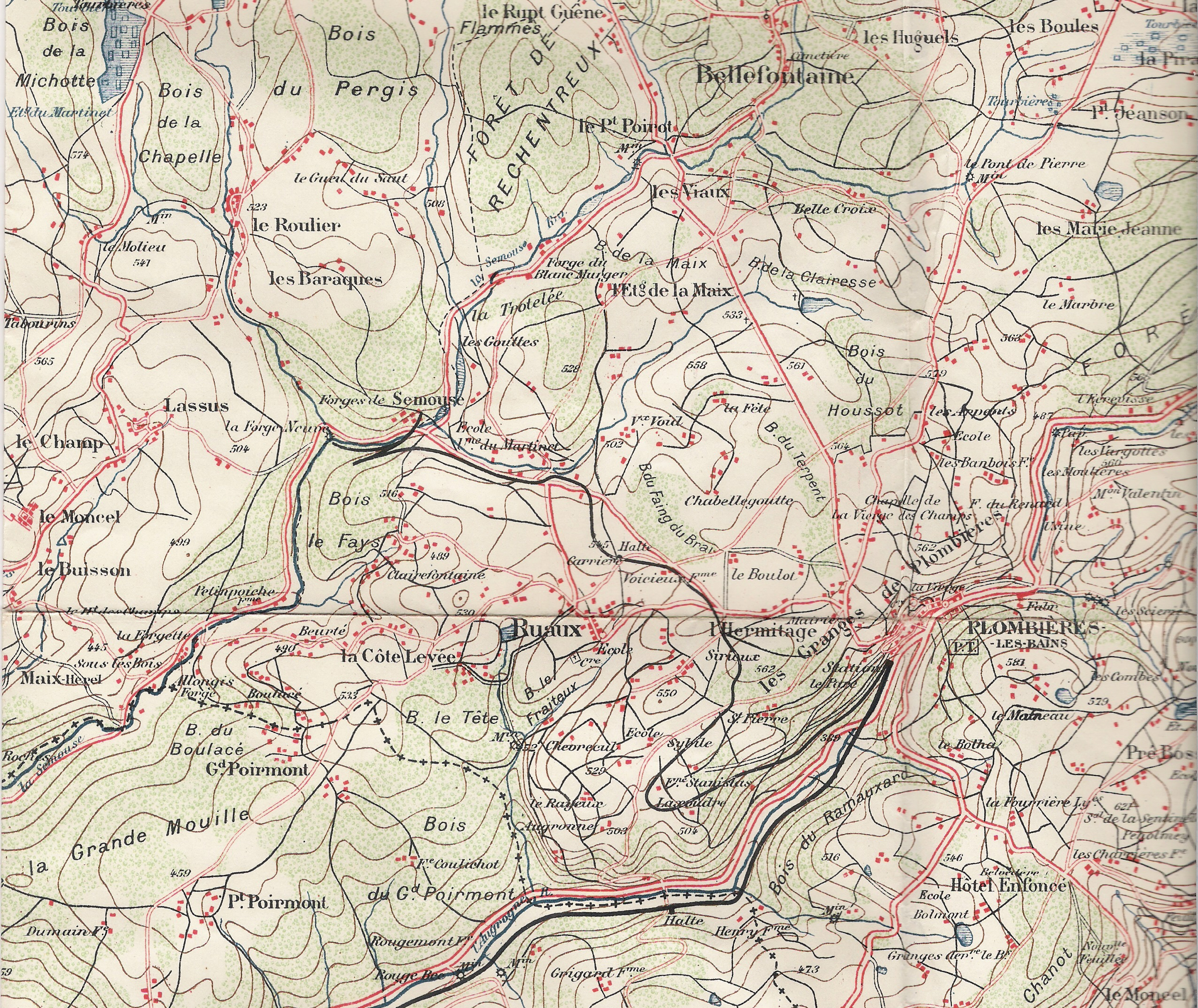 Partie de la carte levée par E. Würth, agent voyer en retraite à Plombières - Editeur : André Lesot ( Paris). Echelle d'origine : 1/50 000ème. Un "voyer" est une personne ayant en charge l'entretien des voies publiques.